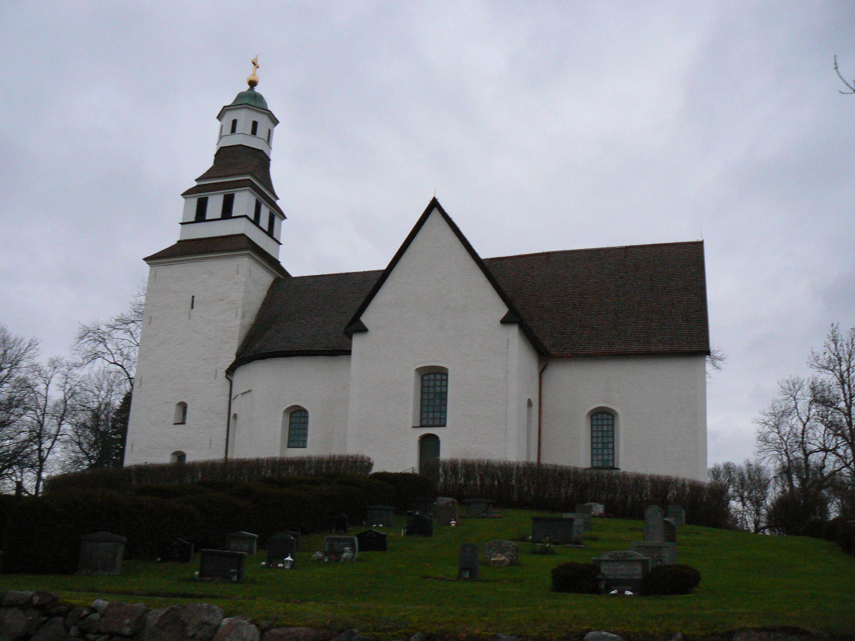 Vårdsbergs kyrka i Linköpings kommun. Vårdsberg Church